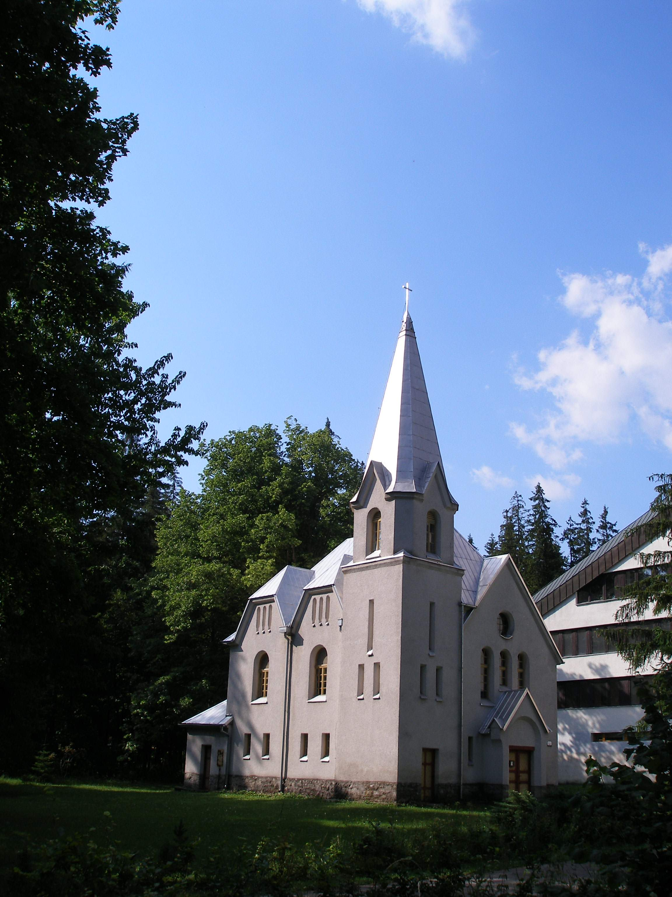 Evanjelický kostol Tatranská Kotlina mesto Vysoké Tatry okres Poprad.